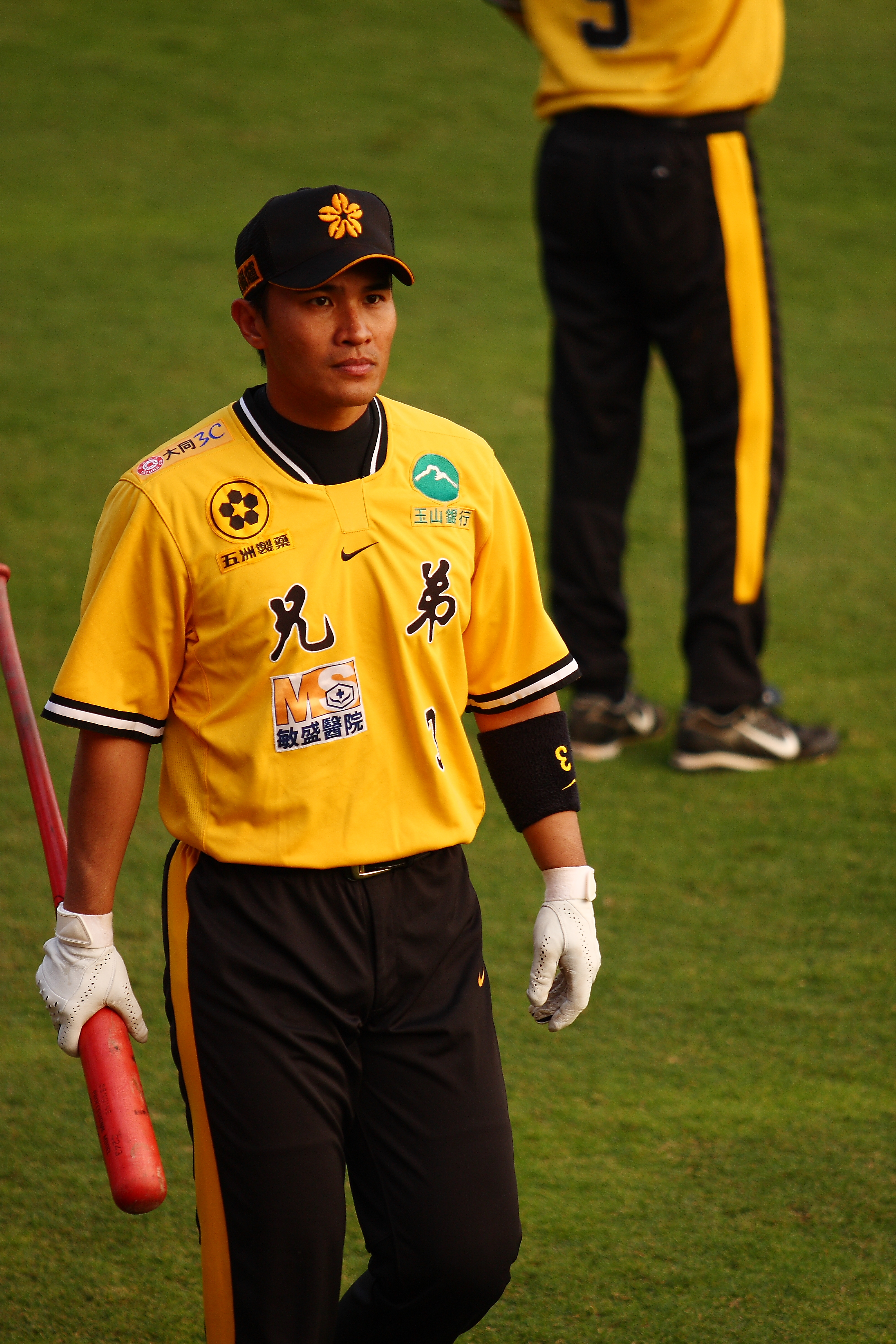 20081101王金勇